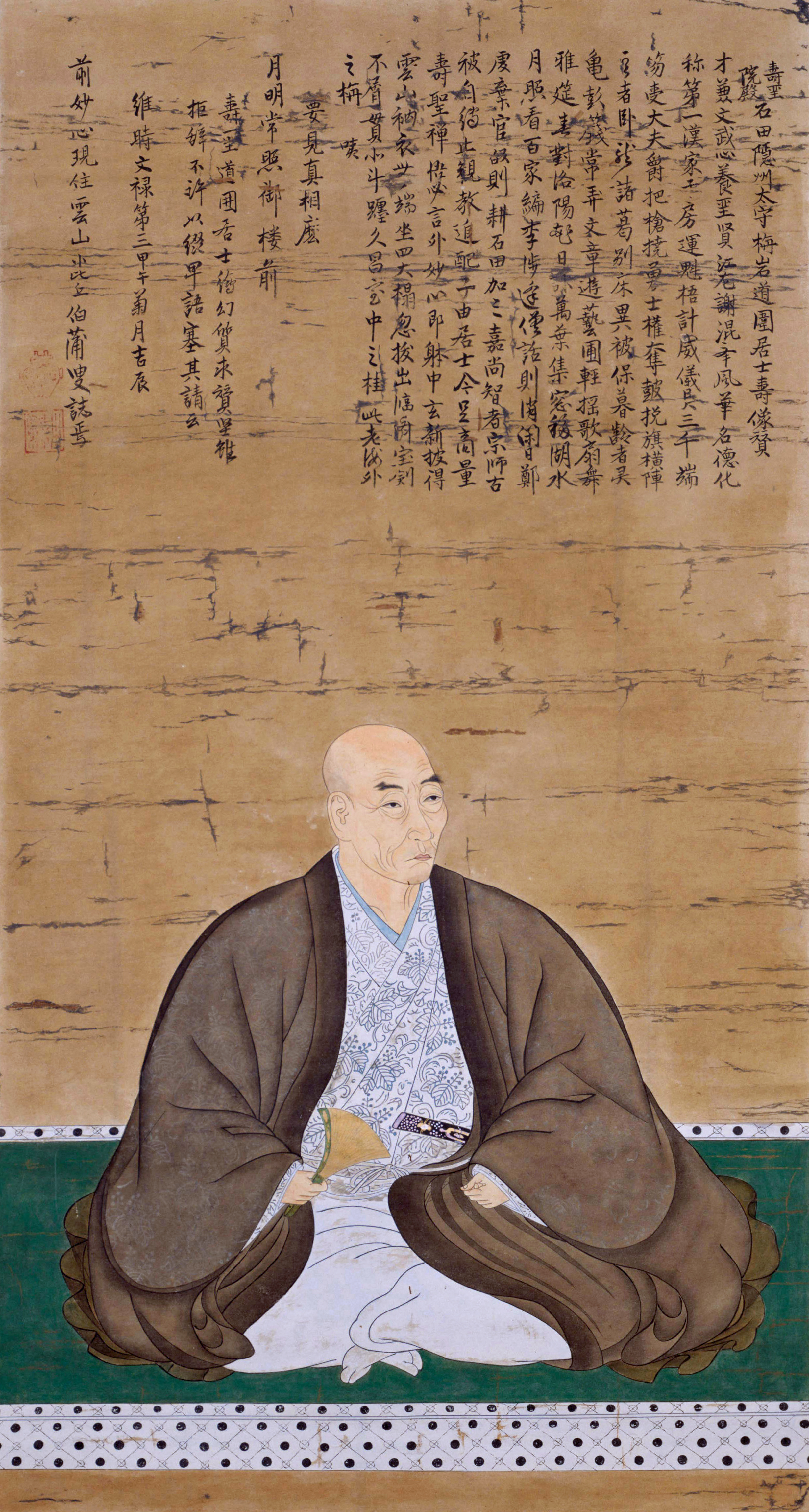 壽聖院殿石田隠州太守栴岩道圍居士壽像賛 才兼文武心養聖賢江左謝混□風華名徳化 称第一漢家□房運魁梧計威儀異三千端 笏受大夫爵把槍撓勇士権奪皷挩旗横陣 雲者臥龍諸葛別床異被保暮齢者霊 亀彭籛常弄文章遊藝圃軽揺歌扇舞 雅筵春對洛陽花日□萬葉集窓移湖水 月照看百家編李渉逢僧話則消閑日鄭 處棄官皈則耕石田加之嘉尚智者宗師古 被自□止観教追配子由居士令足商量 壽聖禪悟必言外妙心即躰中玄新披得 雲山衲衣無端坐四大榻忽抜出臨済宝剣 不屑貫北斗躔久昌室中之桂此老海外 之栴 咦 要見真相麼 月明常照御楼前 寿聖道囲居士繪幻質求賛堅雖 拒辞不許以綴早語塞其請云 維時文禄第三甲午菊月吉辰 前妙心現住雲山小比丘伯蒲叟誌焉